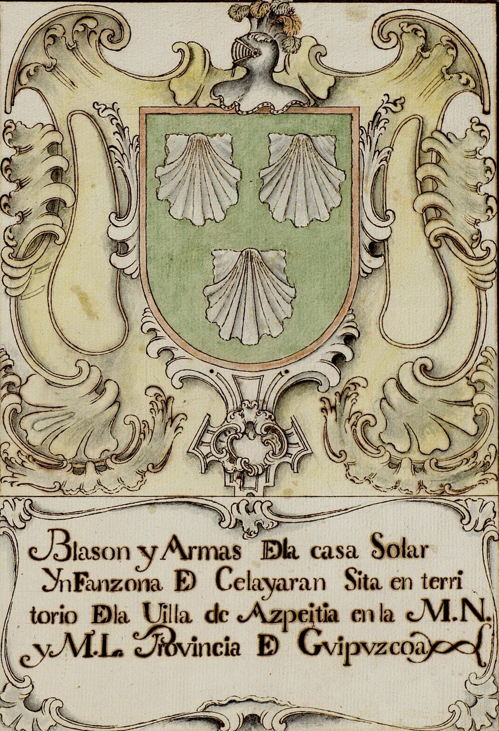 Blasón y Armas de la Casa Ynfanzona de Çelayarán.